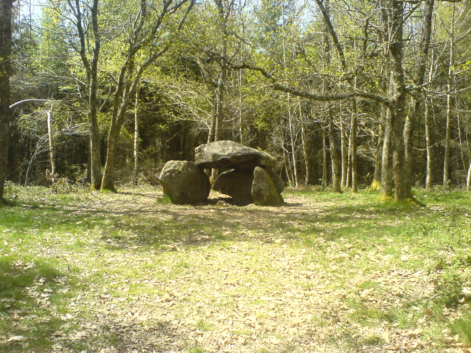 Dolmen